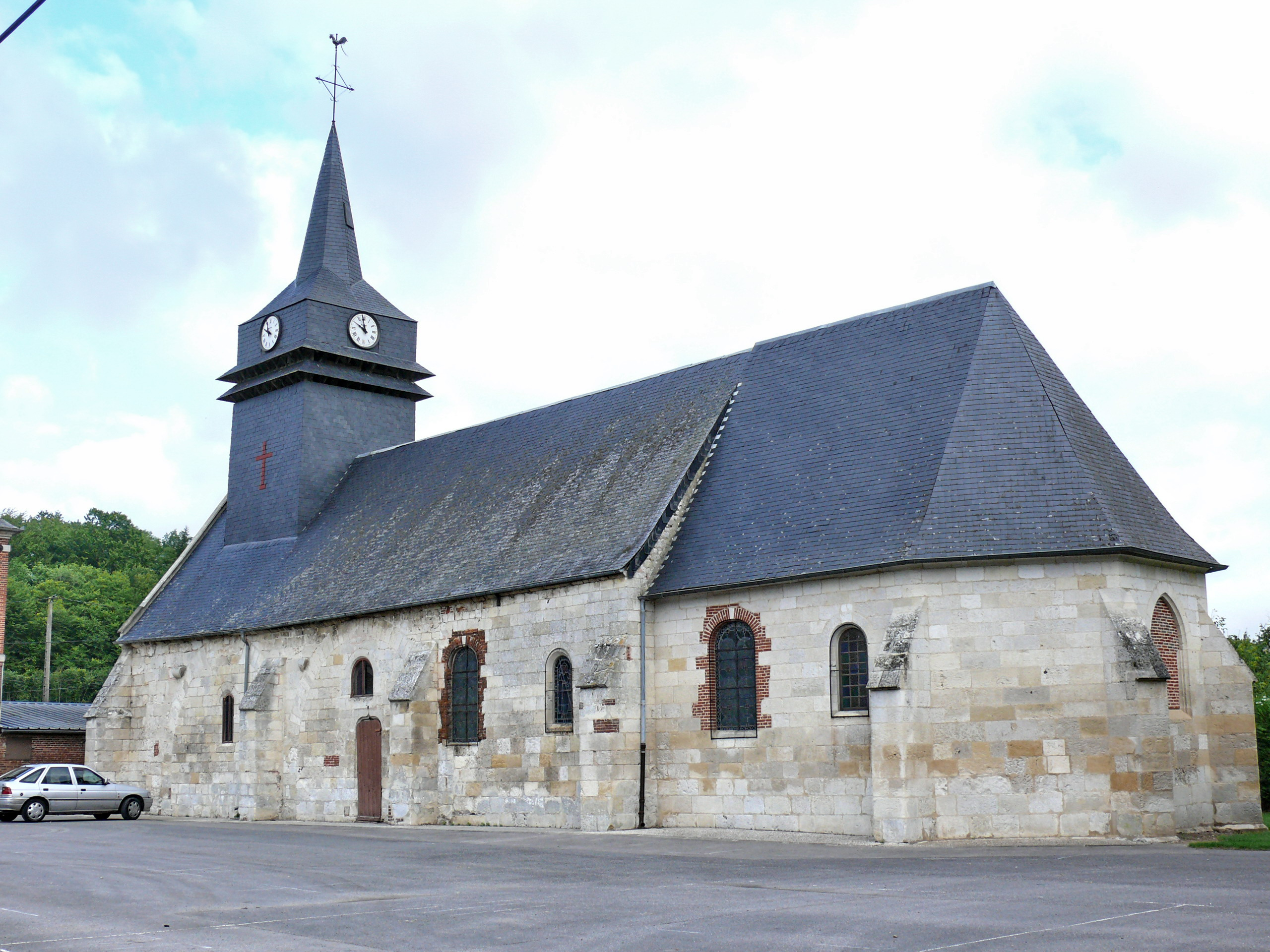 Fontaine-Bonneleau (Oise - Picardie - France) : L'église